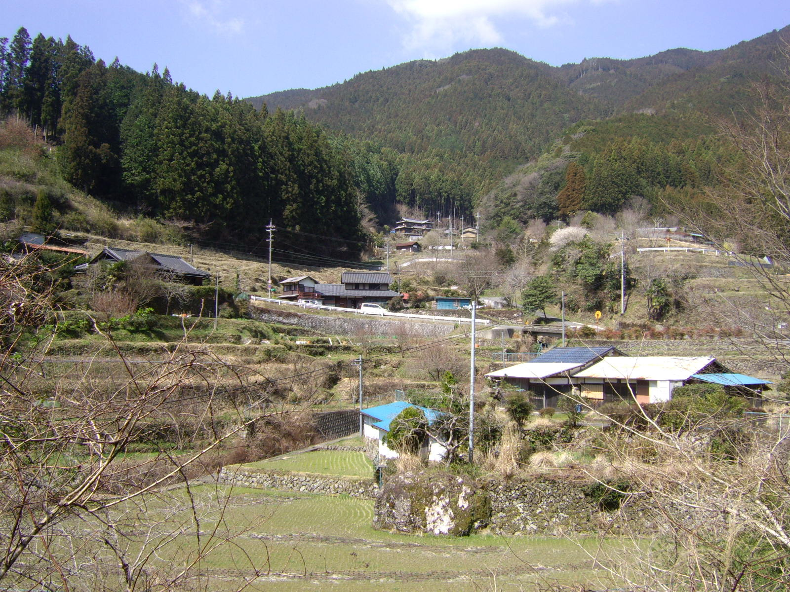 重要文化的景観「蘭島および三田・清水の農山村景観」－三田地区